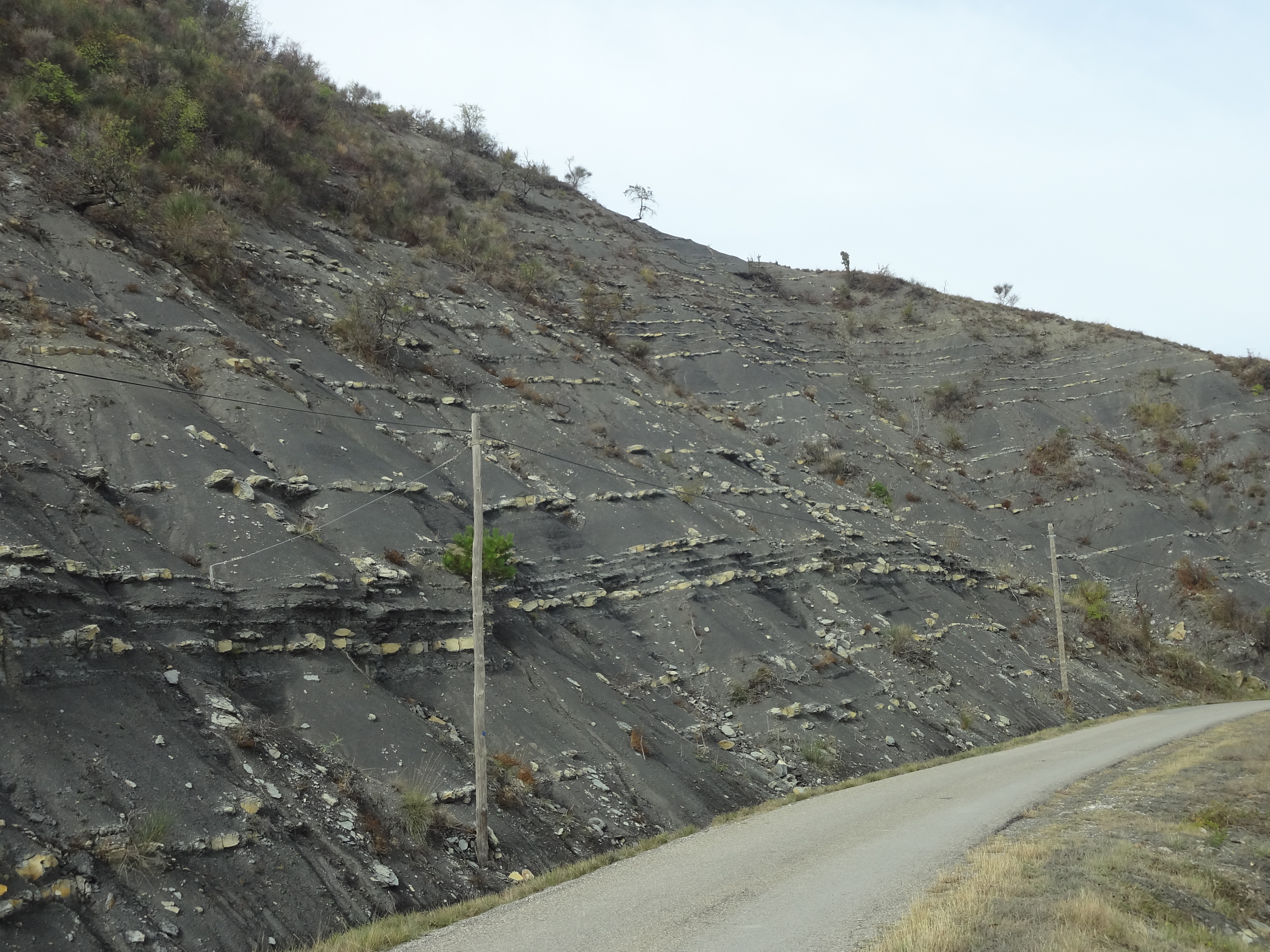 Robines (alternance de schistes noirs et de calcaire)